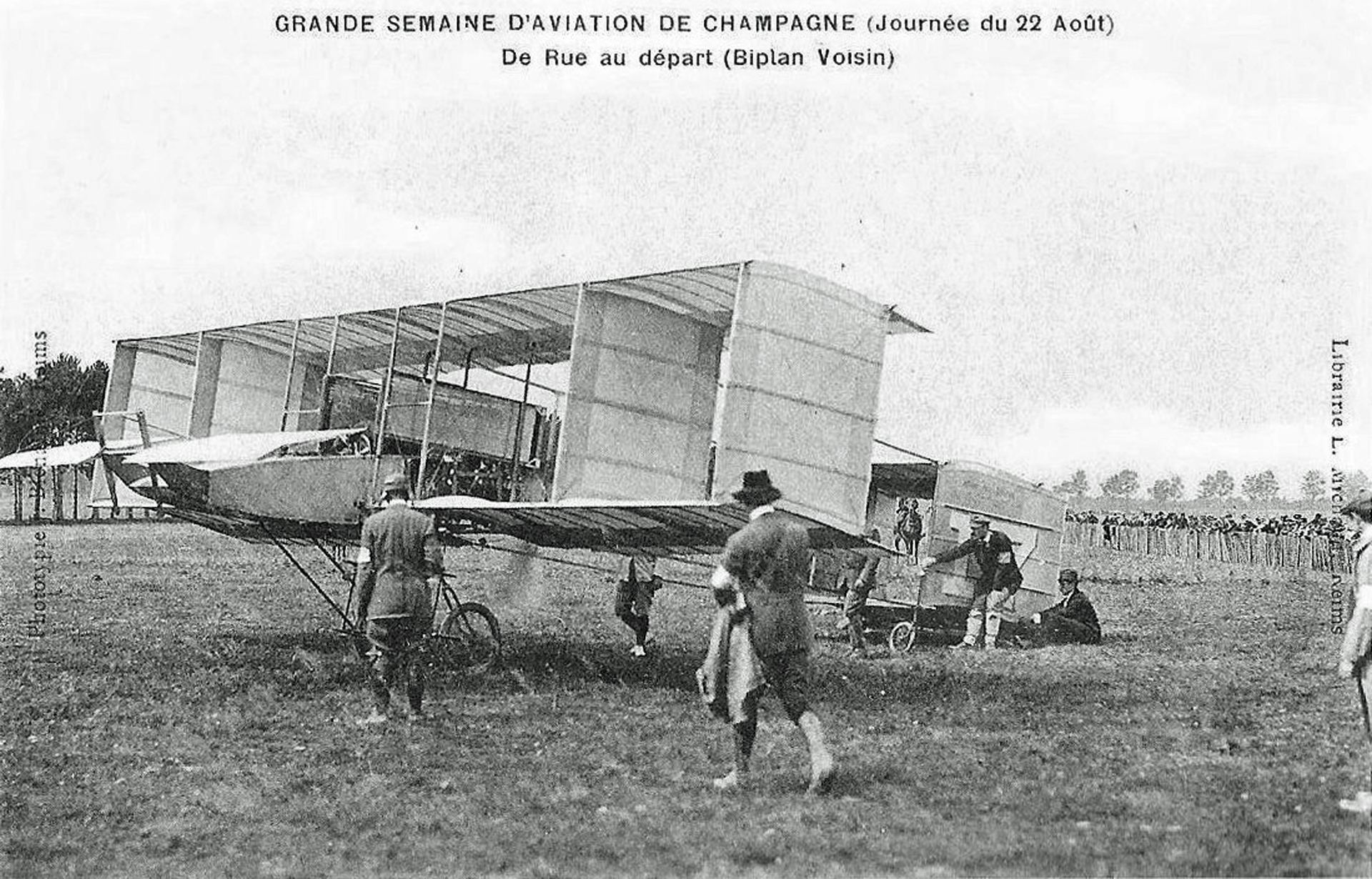 Avec la N°17 de Rue capt Ferber lors de la Grande Semaine d'Aviation de la Champagne .